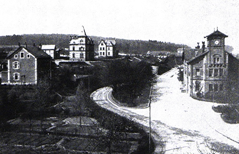 Bild von St. Ingbert - links mit Turm die Jugendherberge - rechts der neue Bahnhof